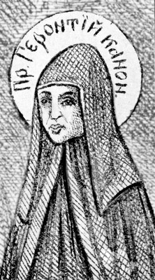 Прп. Геронтий Киево-Печерский, канонарх. Фрагмент литографии «Собор Киево-Печерских святых». 1859 г. (ЦАК МДА)